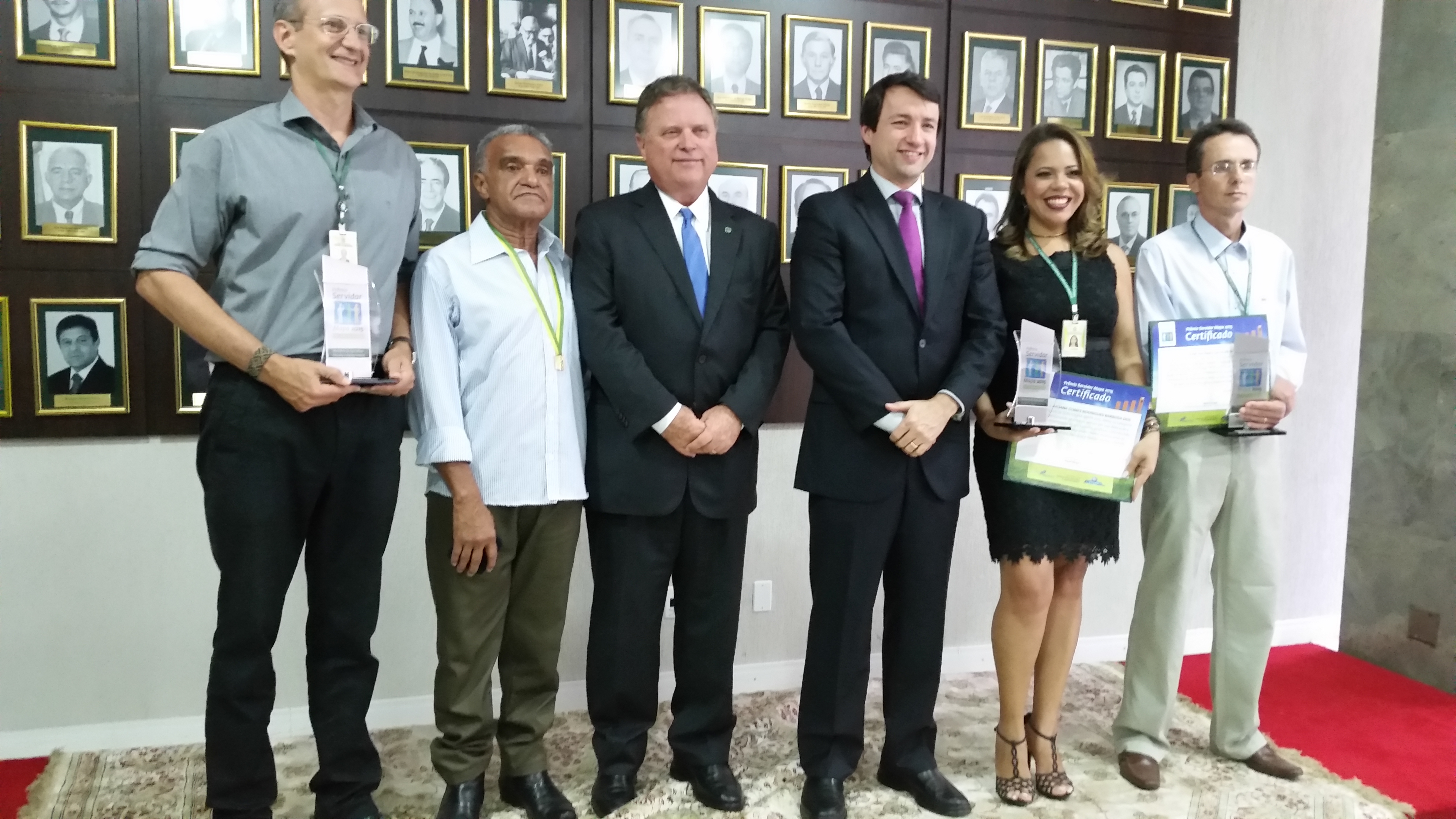 Ministro Blairo Maggi, ao lado do secretário-executivo, Eumar Novacki, participam da entrega do Prêmio Servidor Mapa 2016